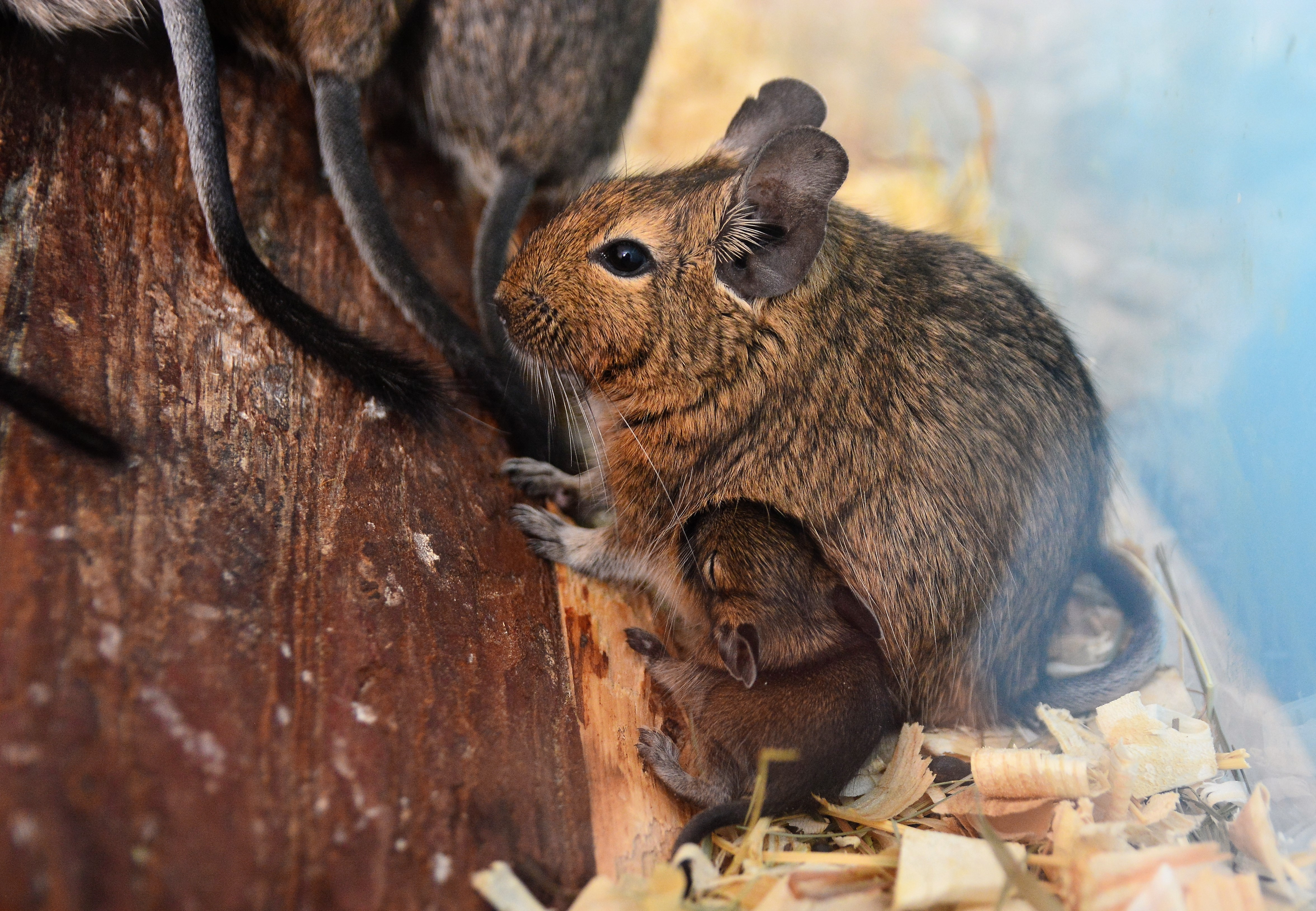 Malý Degu s Maminkou